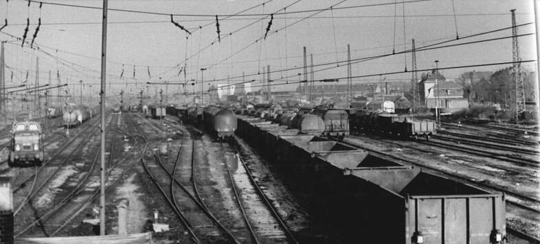 Merseburg, Güterbahnhof Zentralbild Schaar 22.1.71 Bez.Halle-Merseburger Eisenbahner rufen zum Wettbewerb- Die Eisenbahner des Dienstortsbereiches Merseburg-Großkorbetha geben mit ihrem Wettbewerbsprogramm allen 250000 Eisenbahnern der Republik ein Beispiel. Ihr Hauptanliegen ist: Beschleunigung des Warenumlaufs durch sozialistische Rationalisierung. Durch eine einheitliche Transporttechnologie konnten die wagonumlaufzeiten um mehrere Stunden verringert werden. Durch diese Initiative wurde wertvoller zusätzlicher Transportraum geschaffen. Unser Bild zeigt eine Teilübersicht des Güterbahnhofs Merseburg. (Siehe auch K 0122-07-1N und die ADN-Meldungen 1903 u. 1938 v.20.1.71)